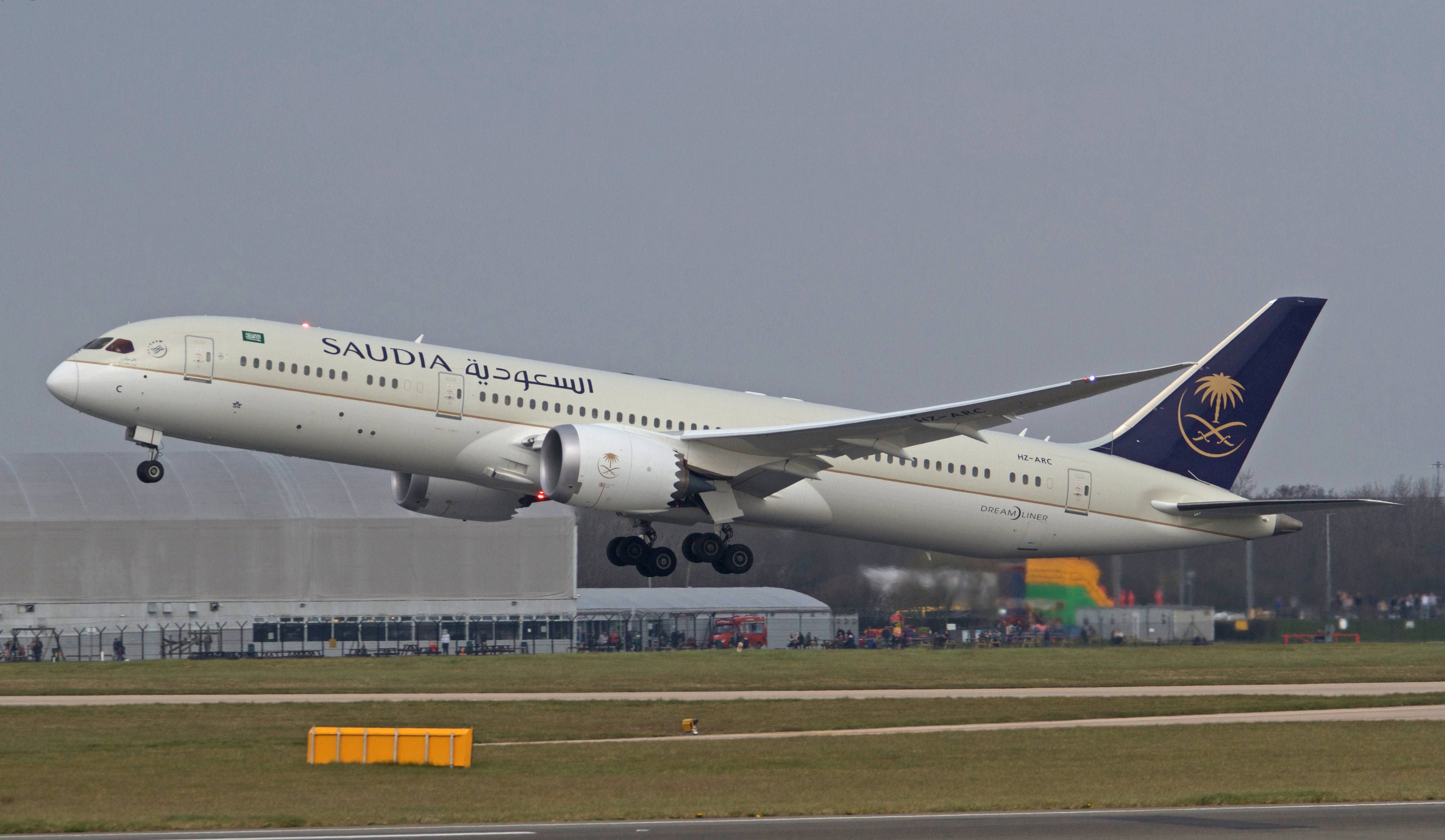 Saudia Boeing B787 HZ-ARC